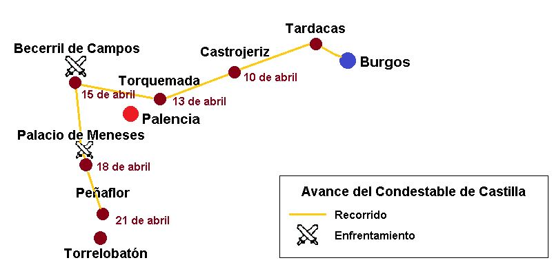 Mapa que representa el recorrido del Condestable de Castilla por las aldeas de las behetrías.